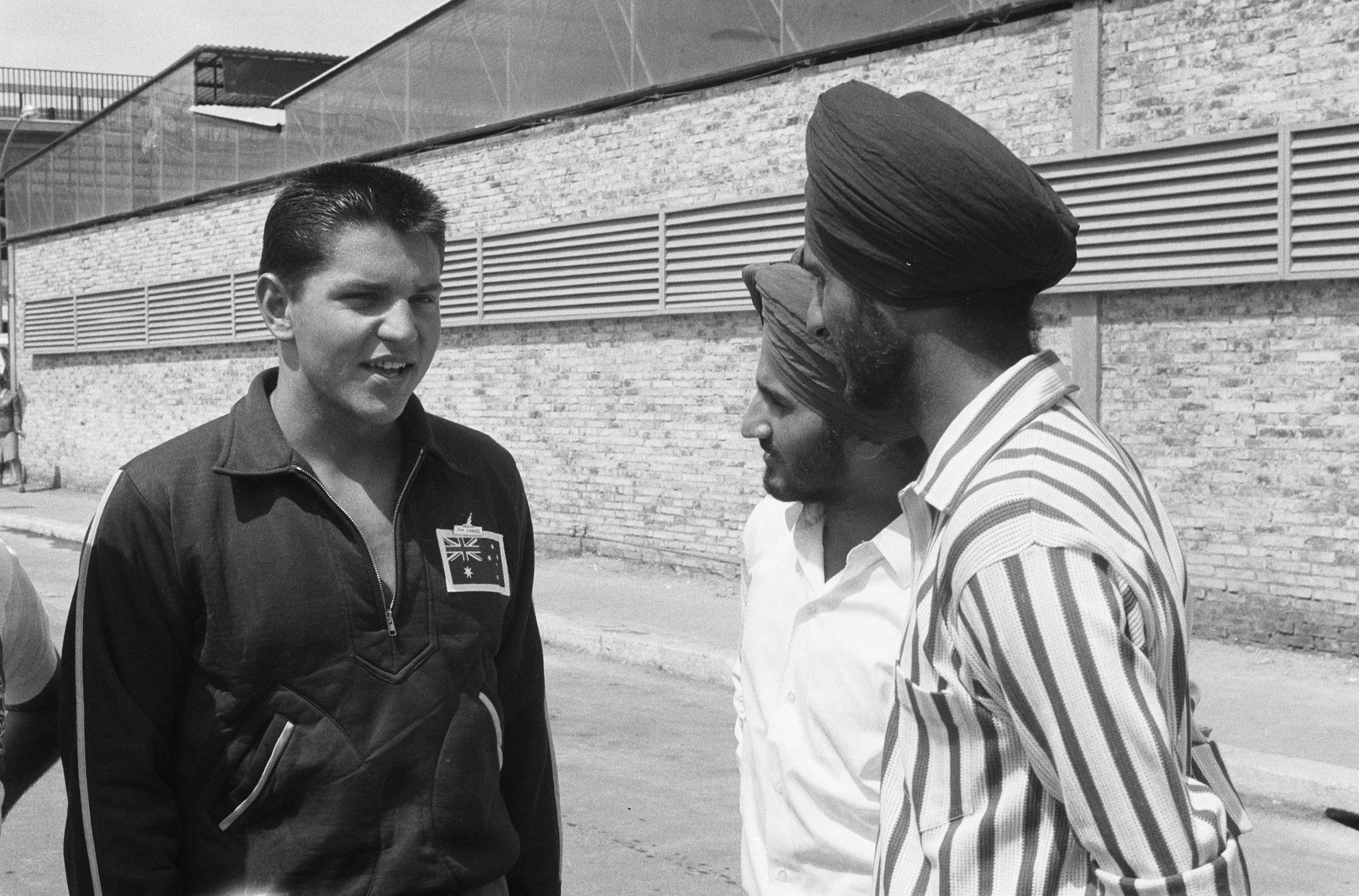 Collectie / Archief : Fotocollectie Anefo Reportage / Serie : [ onbekend ] Beschrijving : Nederlandse zwemsters in Rome, John Konrads in gesprek met 2 deelnemers uit Kenya Datum : 21 augustus 1960 Locatie : Italië, Rome Trefwoorden : GESPREKKEN, deelnemers Persoonsnaam : John Konrads Fotograaf : Pot, Harry / Anefo Auteursrechthebbende : Nationaal Archief Materiaalsoort : Negatief (zwart/wit) Nummer archiefinventaris : bekijk toegang 2.24.01.05 Bestanddeelnummer : 911-5198